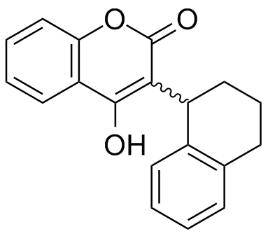 Kumatetralyl, kumarínový antikoagulant 1. generácie.